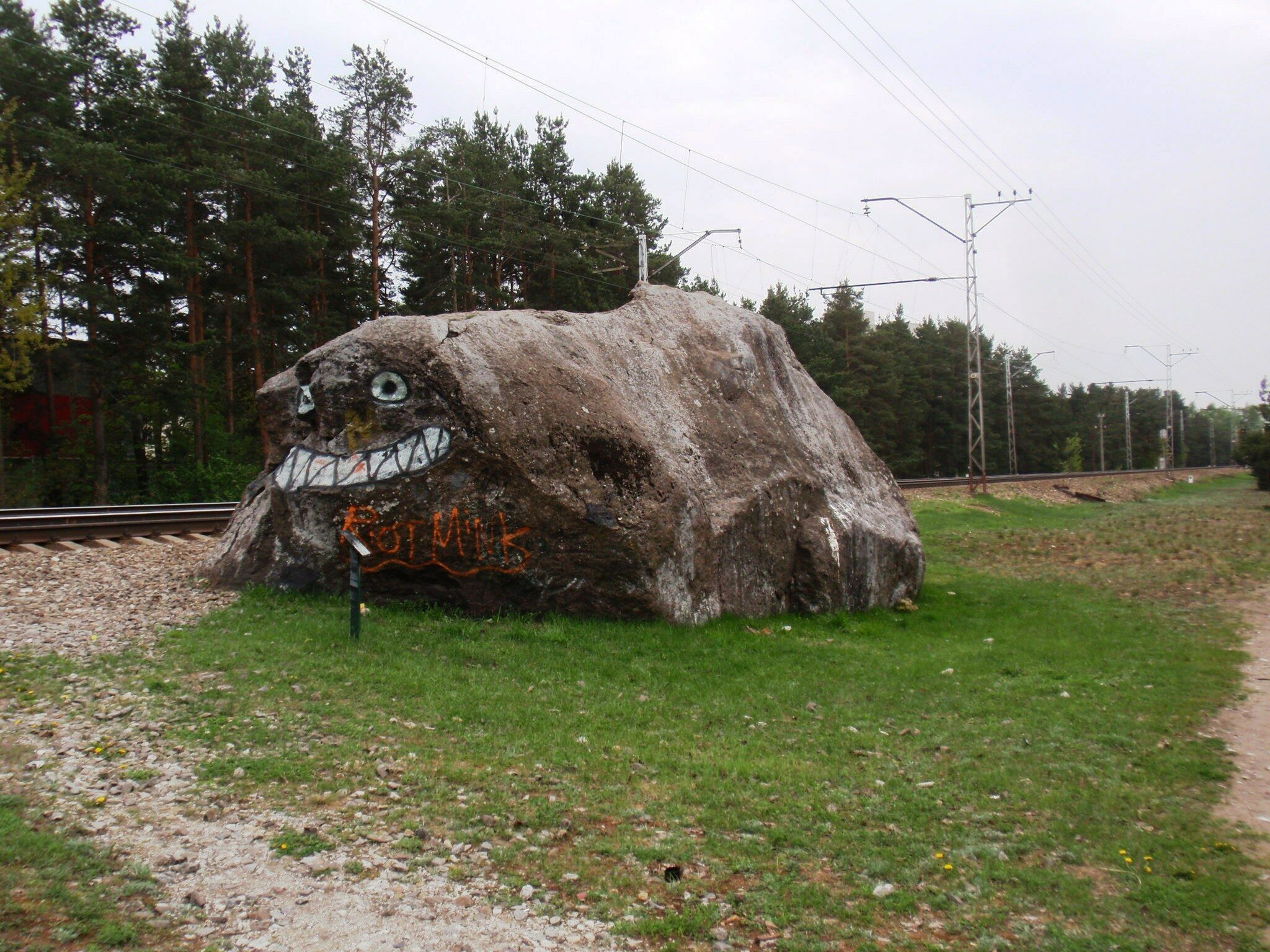 Rahumäe_hiidrahn